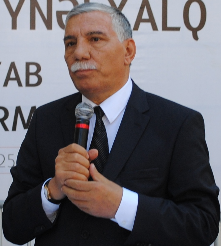 Zəlimxan Yaqub